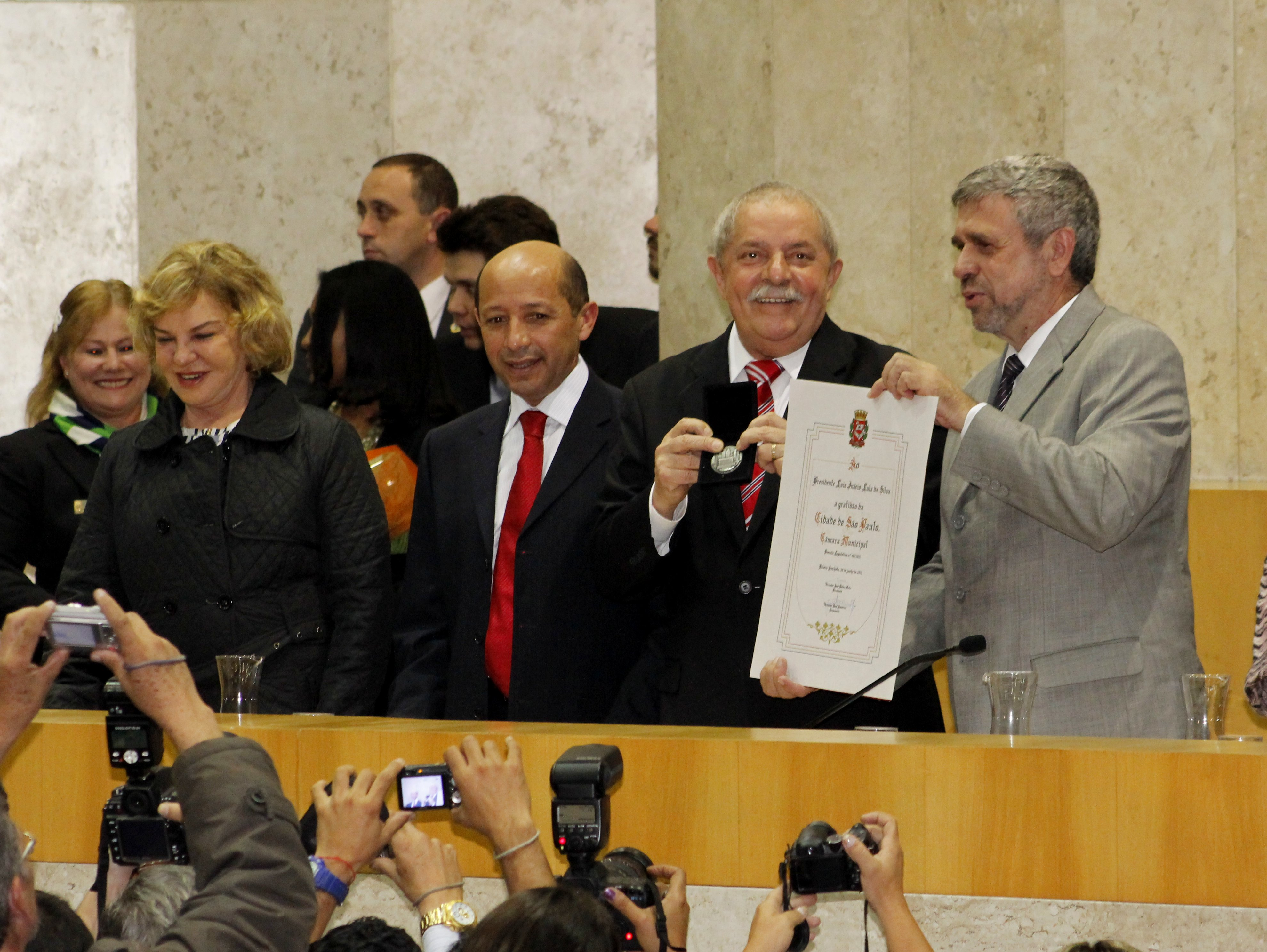 Lula recebe Título de Cidadão Paulistano na Câmara Municpal de São Paulo